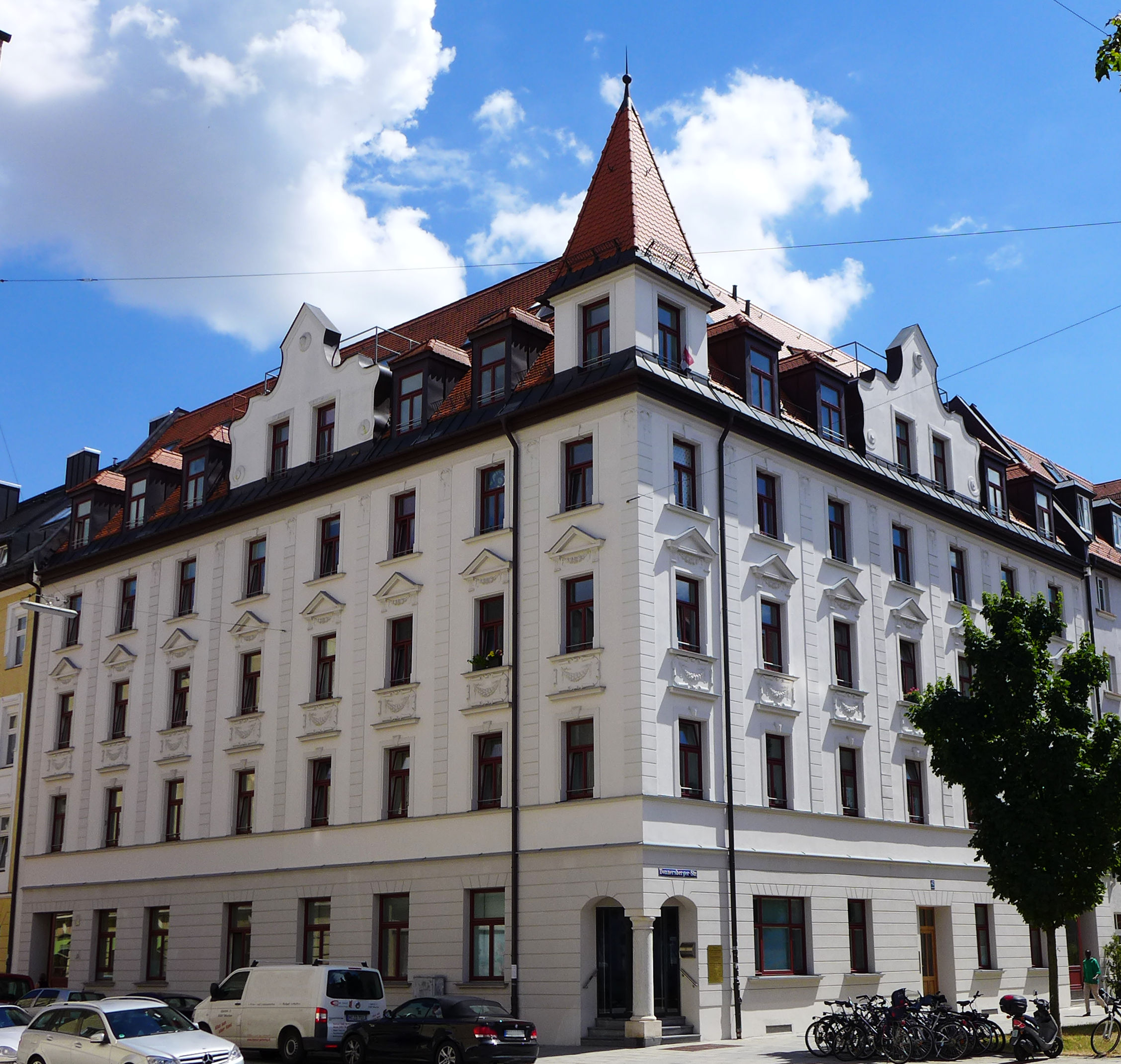 Donnersbergerstr. 7, München